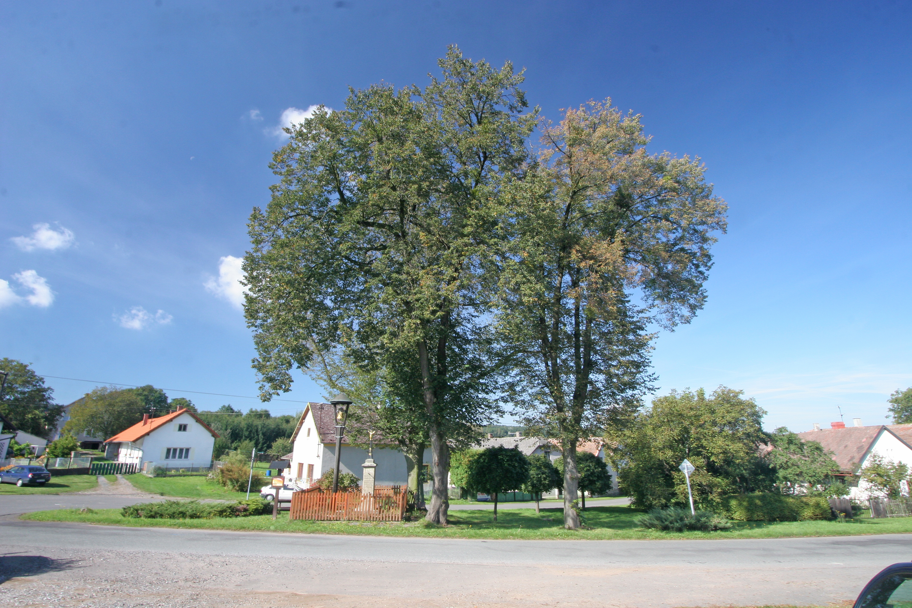 Vyžice náves